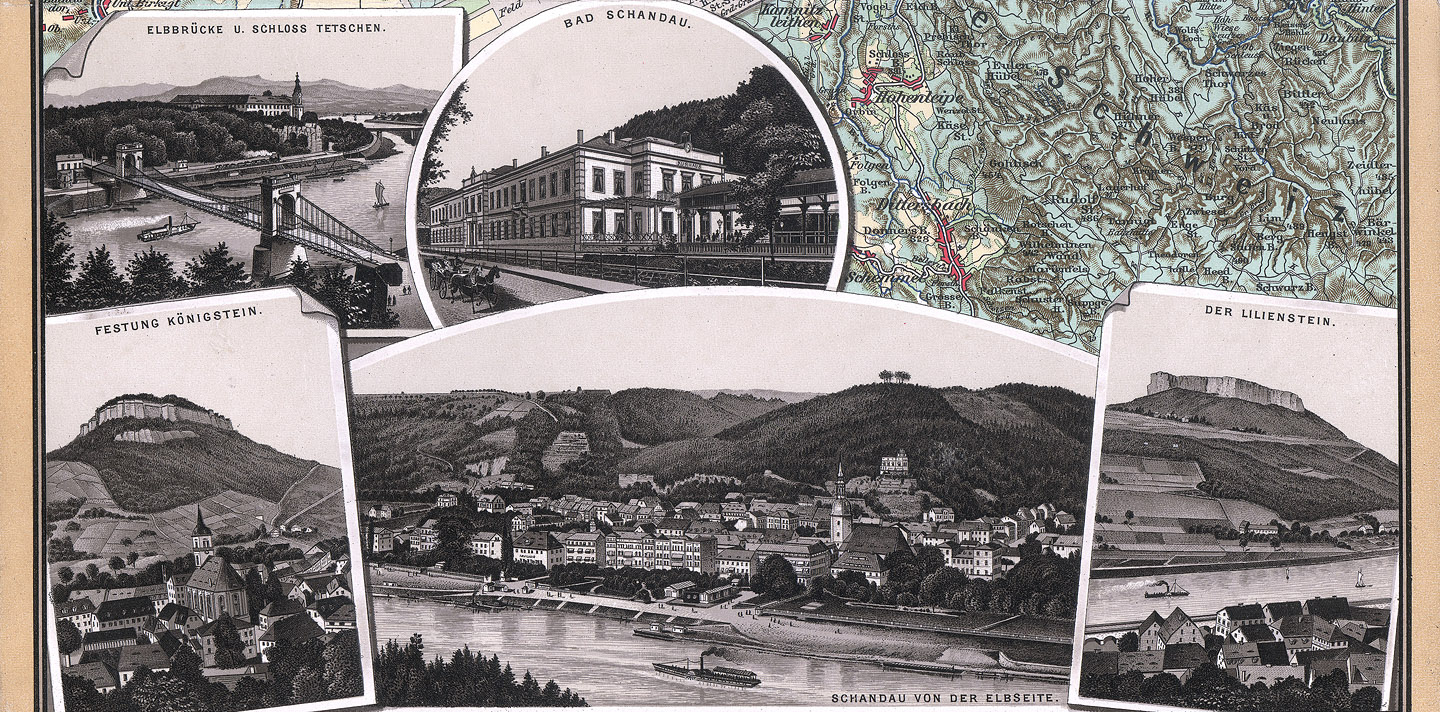 Emil Pinkau & Co AG: "Elbpanorama von Tetschen bis Dresden", Ausschnitt. Photolithographie, ca. 1895, 18 x 27 cm. Der Ausschnitt zeigt die große Qualität der Drucke Pinkaus. So wurden mehrere Lithographische Techniken miteinander kombiniert, um dem Eindruck der Fotografie möglichst nahe zu kommen, wie Kreide-Lithographie, Feder-Lithographie und Platten-Kolorierung